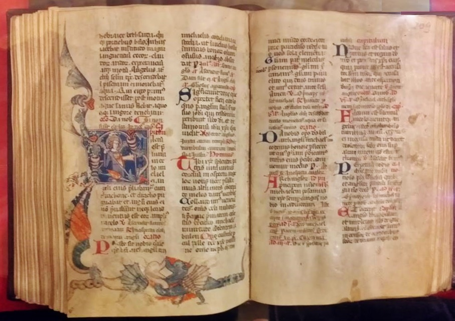 Breviario originale della Sacra di San Michele